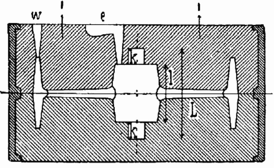 Guss in verlorener Form. Oben: Oberkasten, unten: Unterkasten